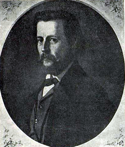 Theodor Aman - Portretul sculptorului Karl Stork